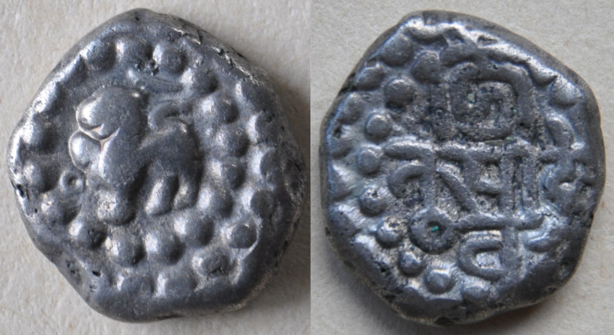 Un statère de Narasimhavarman I (630-668) de la dynastie Pallava du Sud de l'Inde (Tamil Nadu, Andhra Pradesh) Dimension : 15 mm Poids 4,16 g. Argent Référence : M. NIS 696 Coins of rulers of India